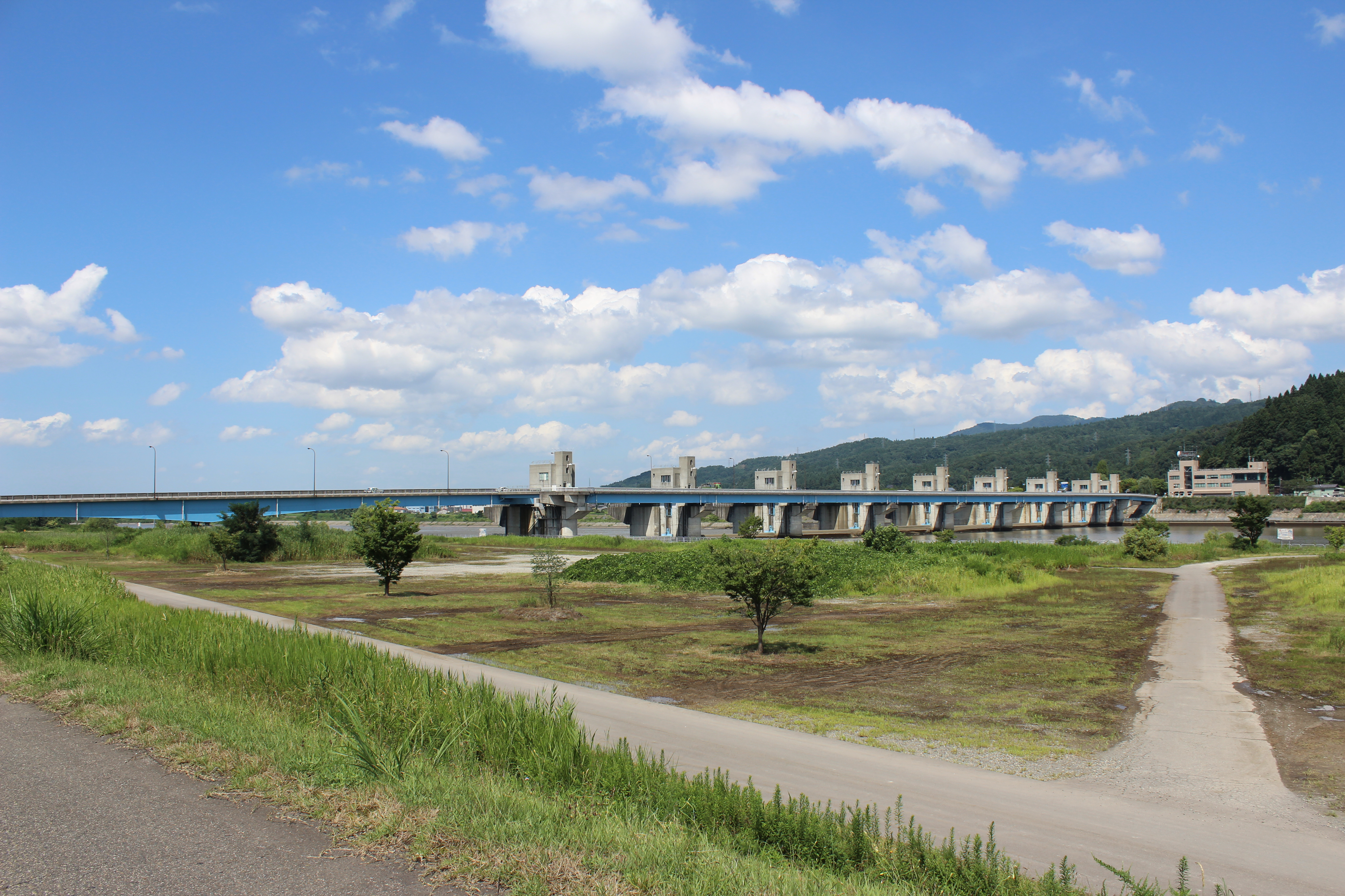 越の大橋。新潟県小千谷市/長岡市境界。